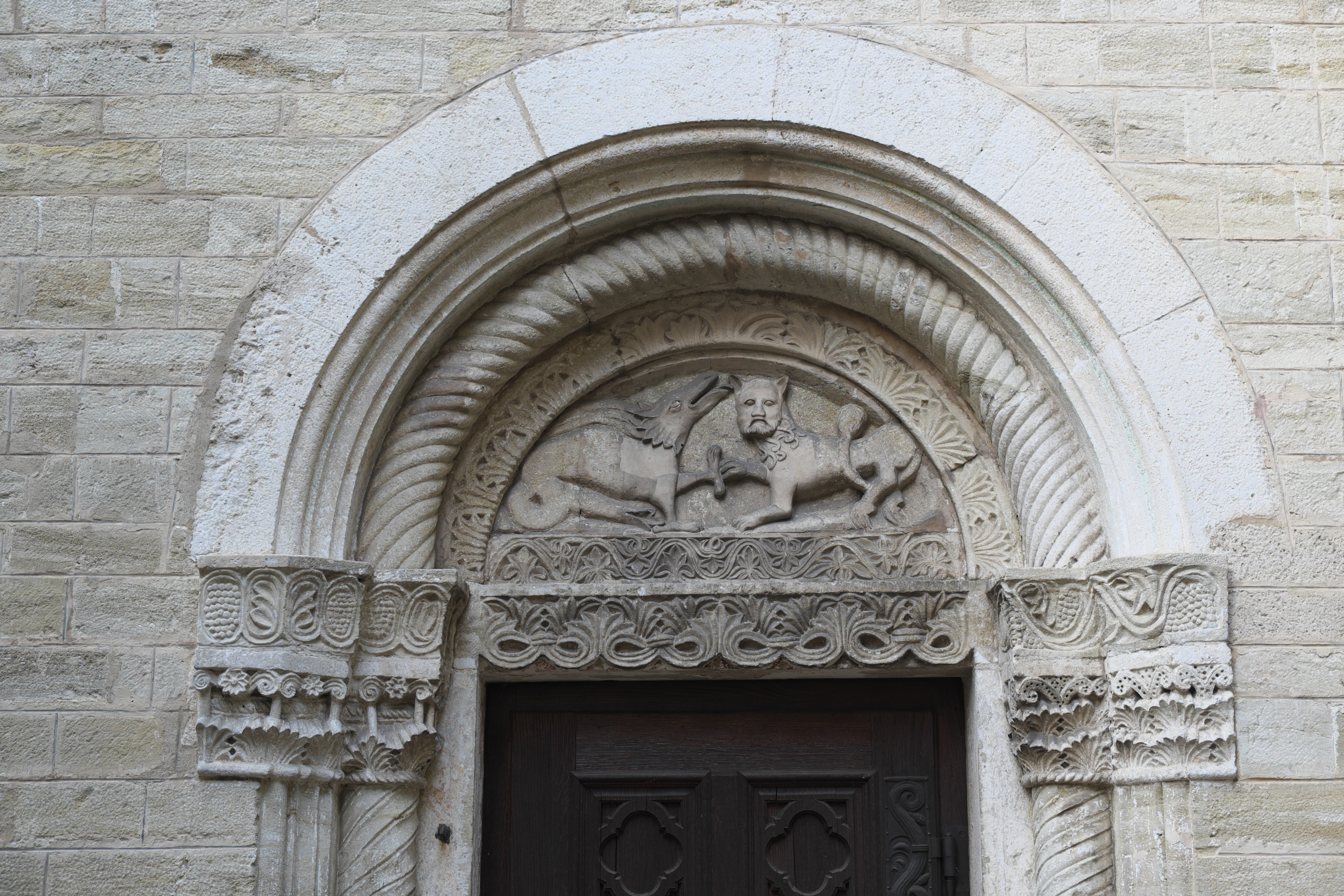 Alte katholische Pfarrkirche St. Peter in Straubing (Bayern/Deutschland), romanisches Südportal mit Tympanon